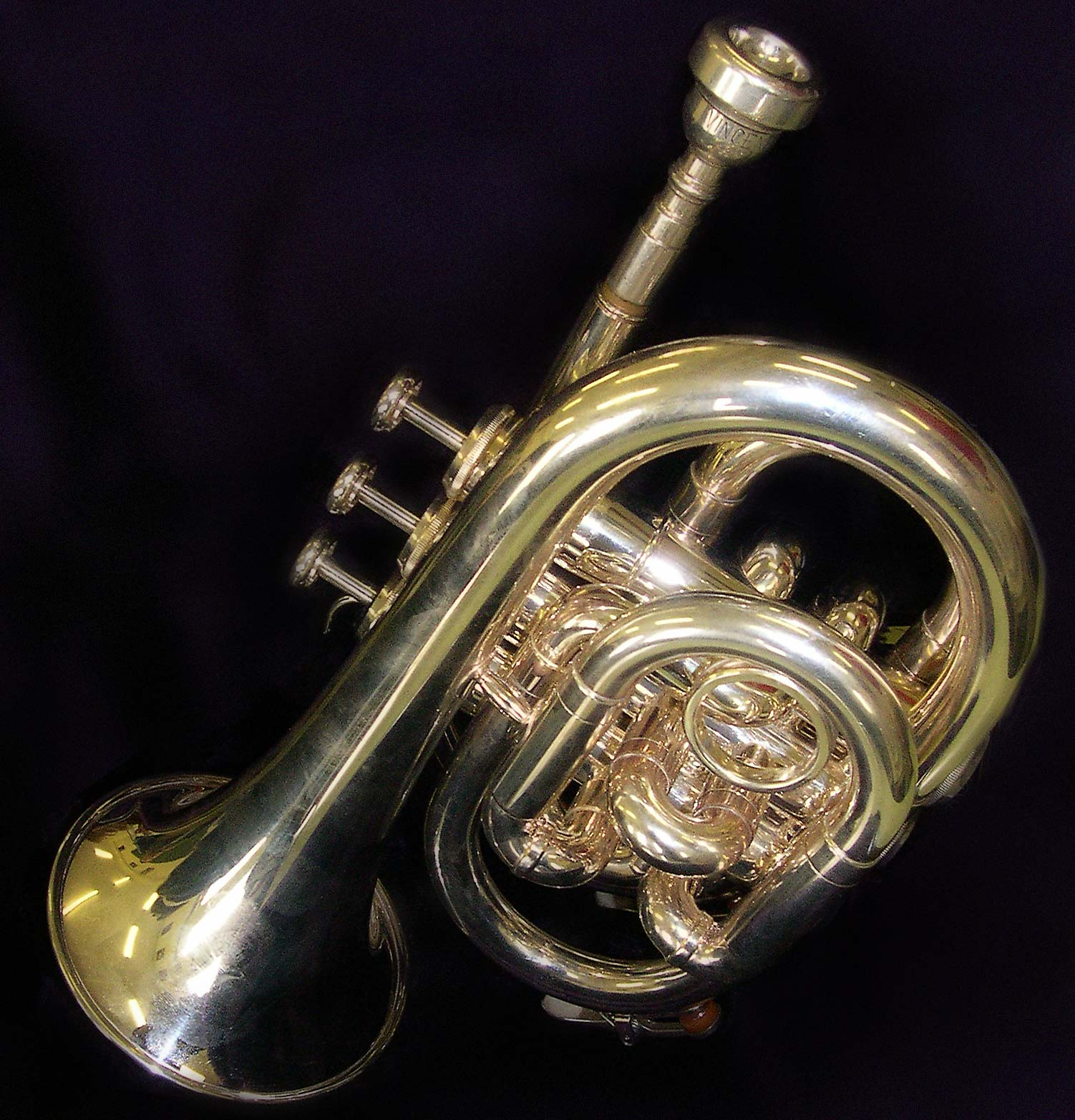 La «trompeta pocket» o trompeta de bolsillo es un instrumento de la familia de viento-metal con boquilla